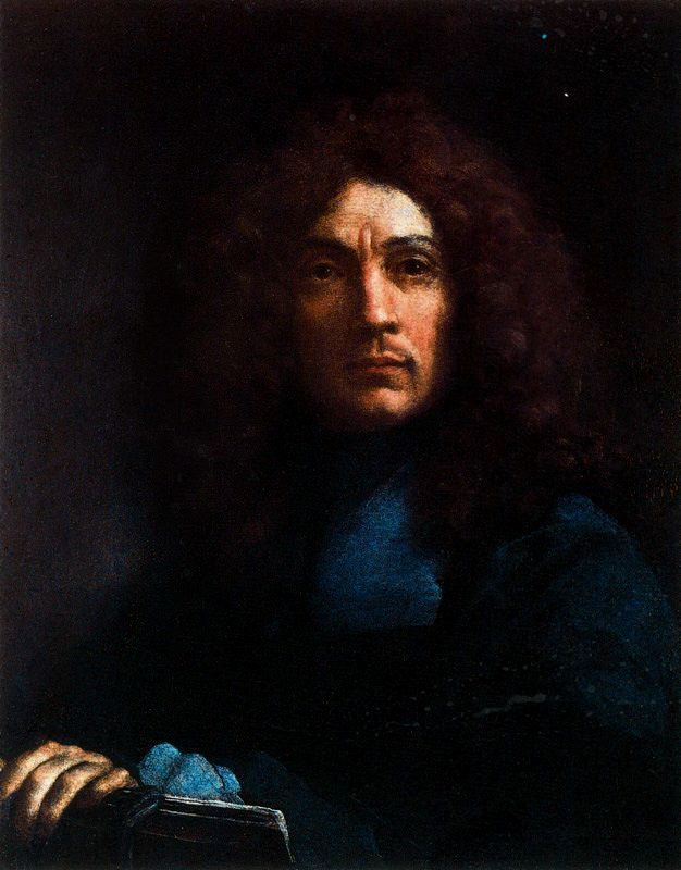 scansione di foto riproducente il dipinto di Carlo Maratta La vergine con Bambino e i santi Ambrogio, Francesco di Sales e Nicola